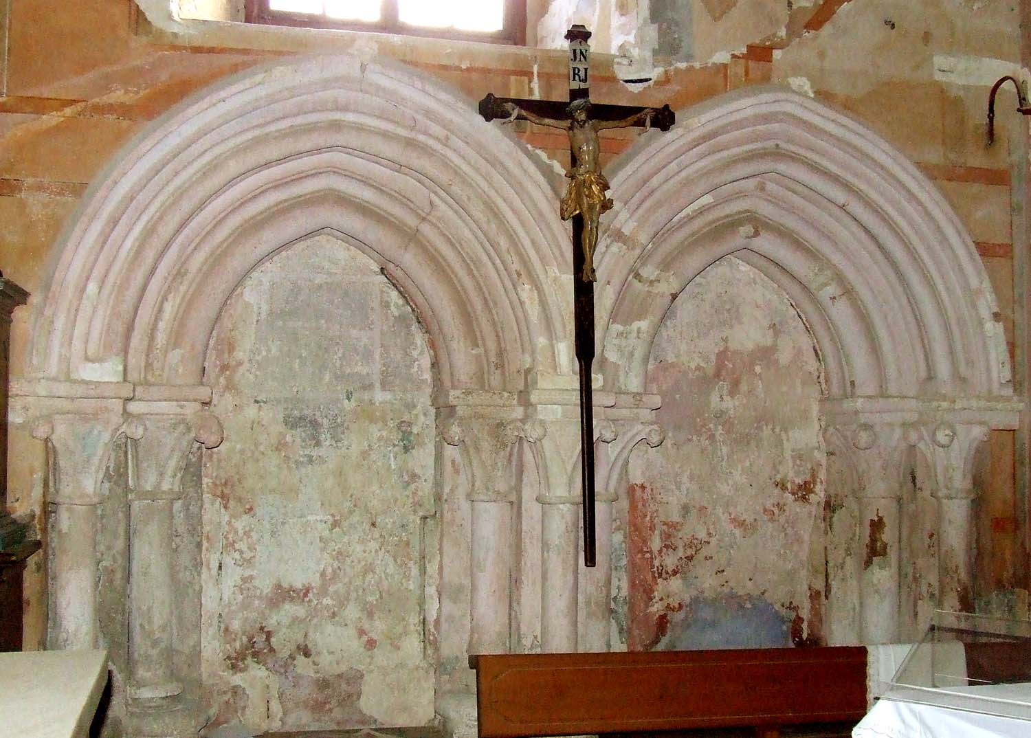 Romanske sedilje v nekdanji Ecclesii minor v Špitaliču poleg Žič nakazujejo s svojimi stebriči prihod gotike.